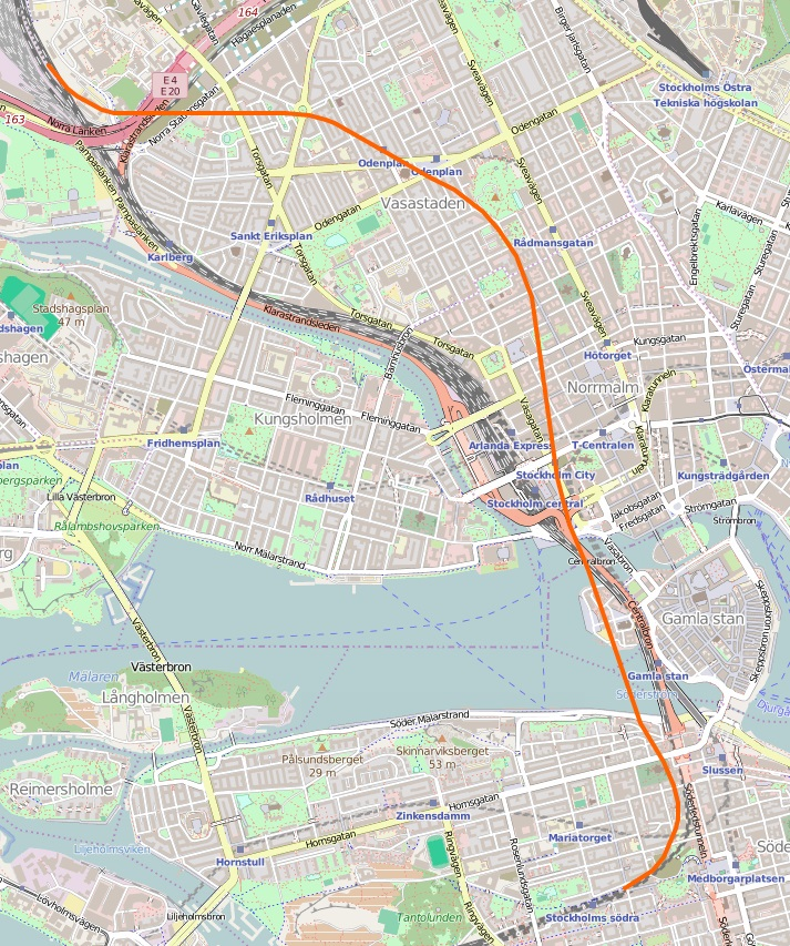 Karta över Citybanans tunnelsträckning genom Stockholm